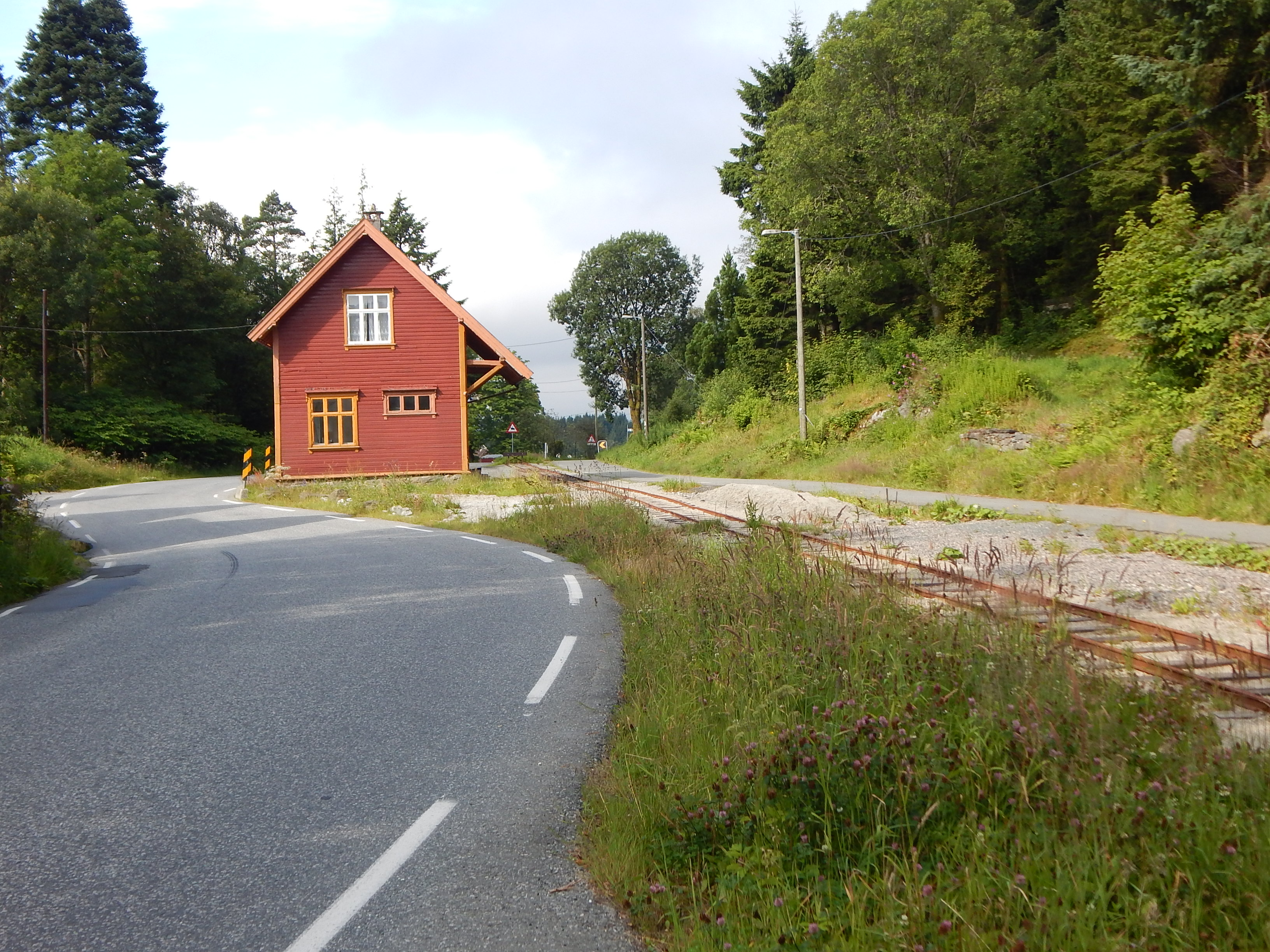 Fylkesvei 169 forbi Stend stasjon